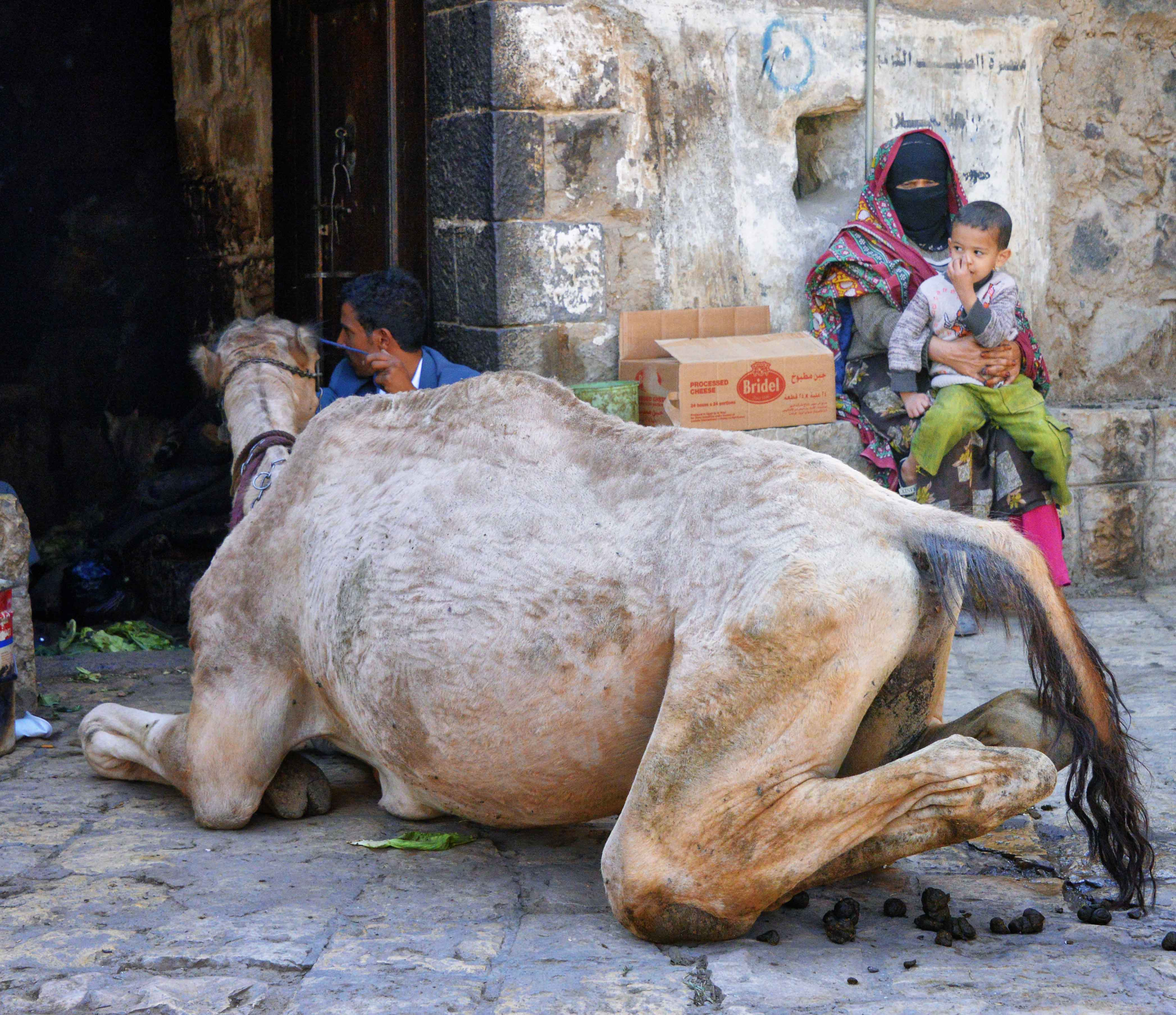 Working Camel, Yemen